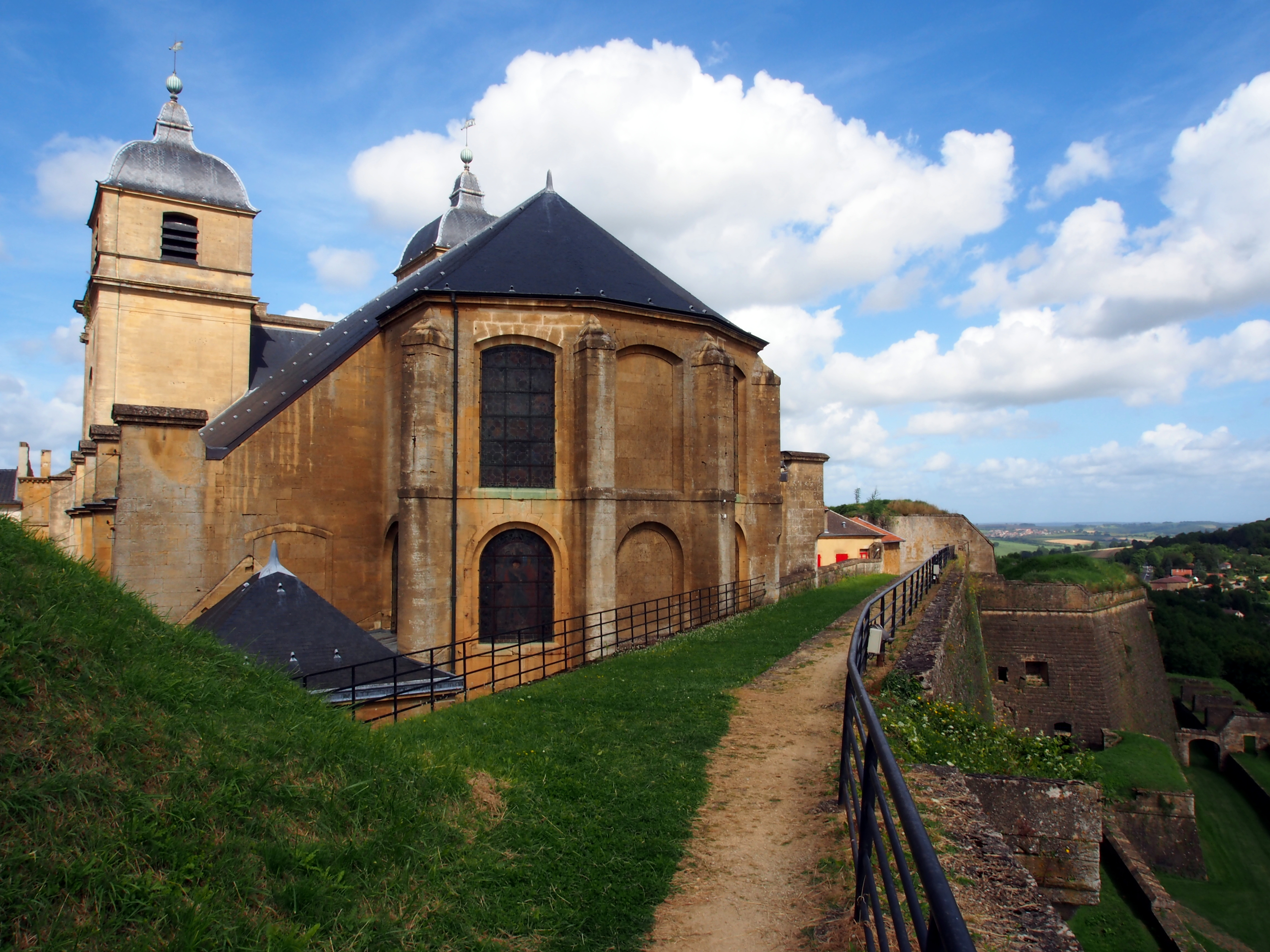 Citadelle de Montmédy church.